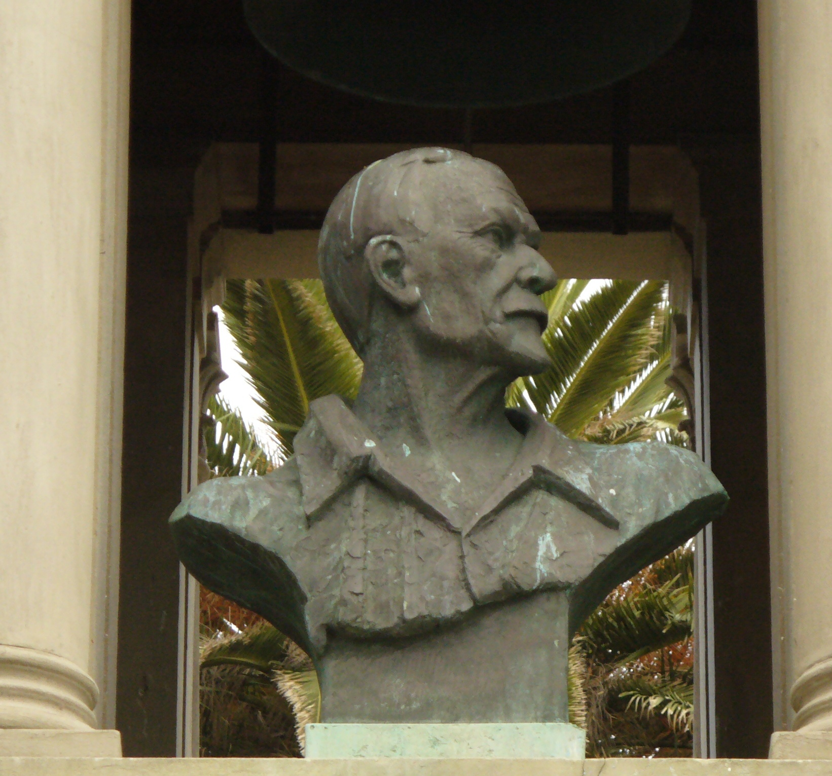 Bust Jan Smuts